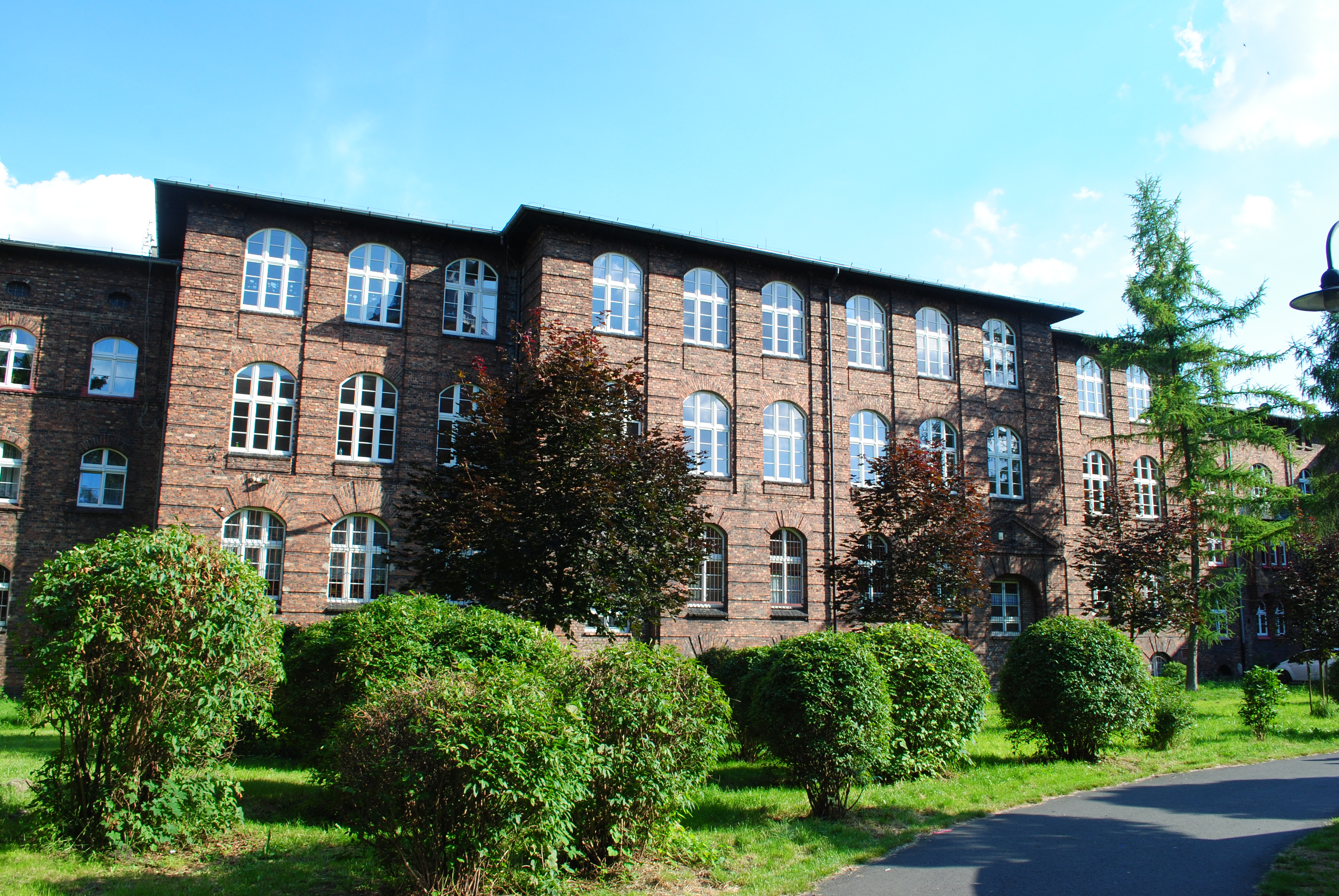 Katowice - Janów-Nikiszowiec. Szkoła Podstawowa nr 53 im. S. Żeromskiego